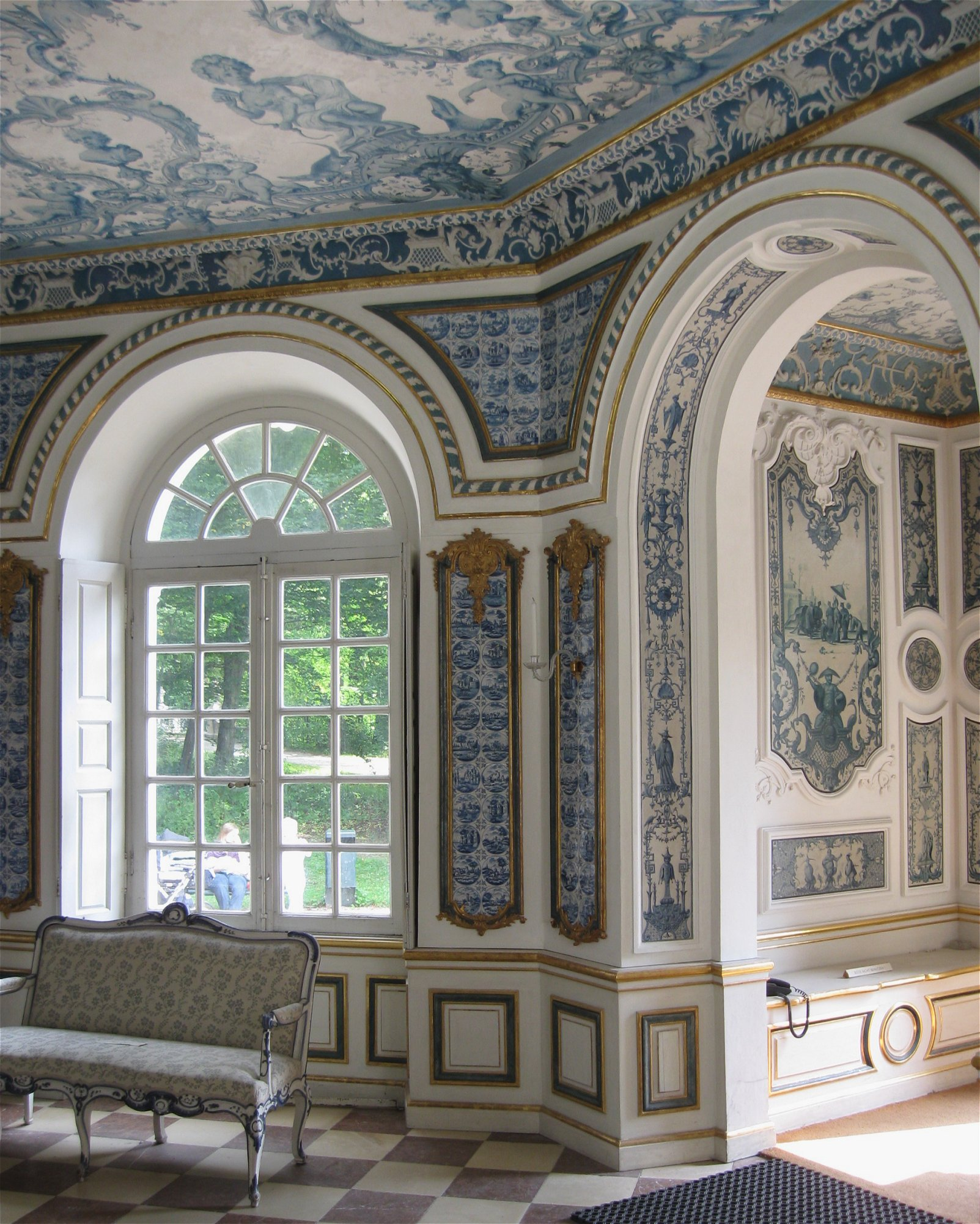 Blaumalerei an der Decke und in der Türlaibung und blauweiße Delfter Kacheln an den Wänden. Saal im Erdgeschoss der Pagodenburg, 1716-1719, Schlosspark Nymphenburg, München.